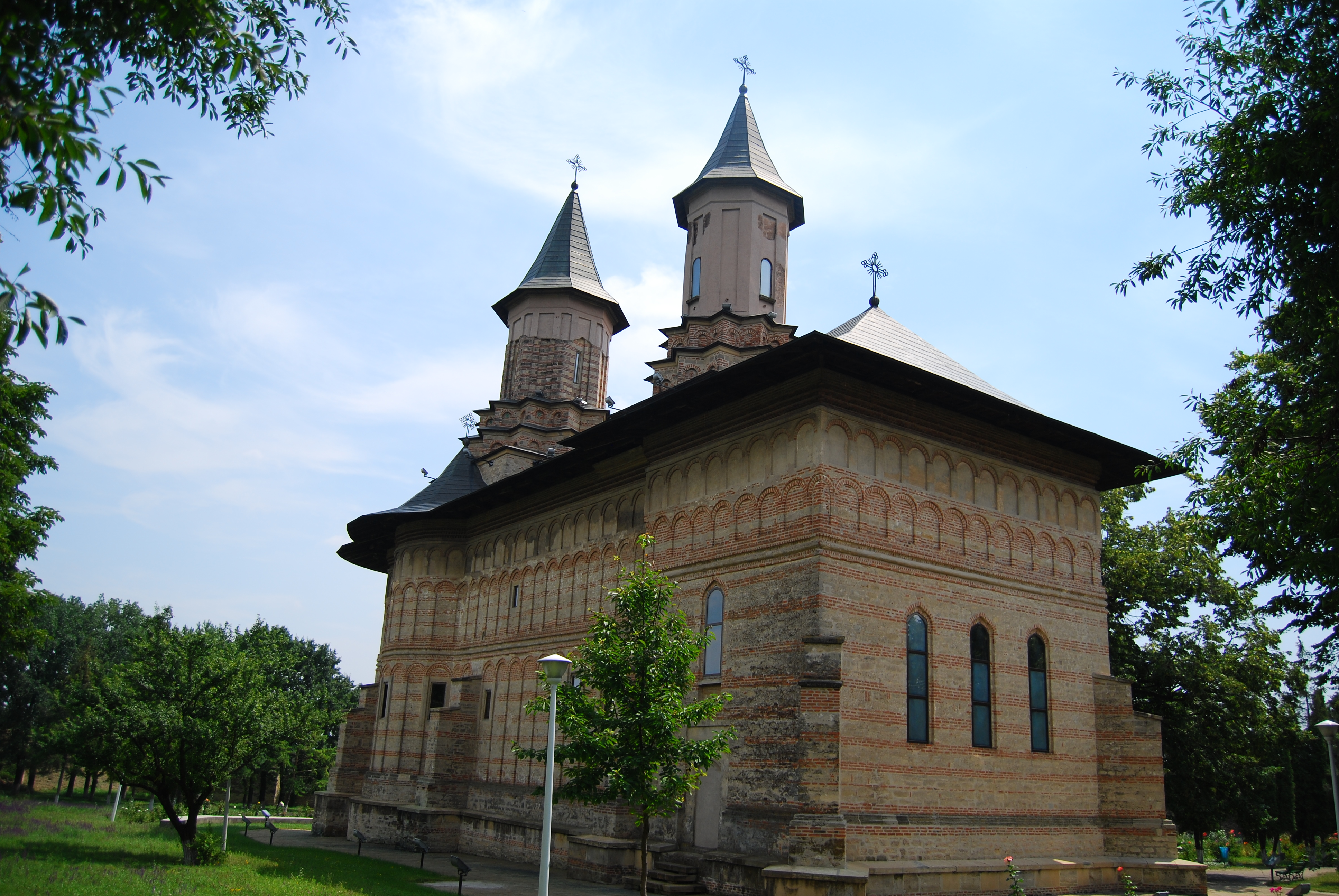 Biserica "Înălțarea Domnului" 01